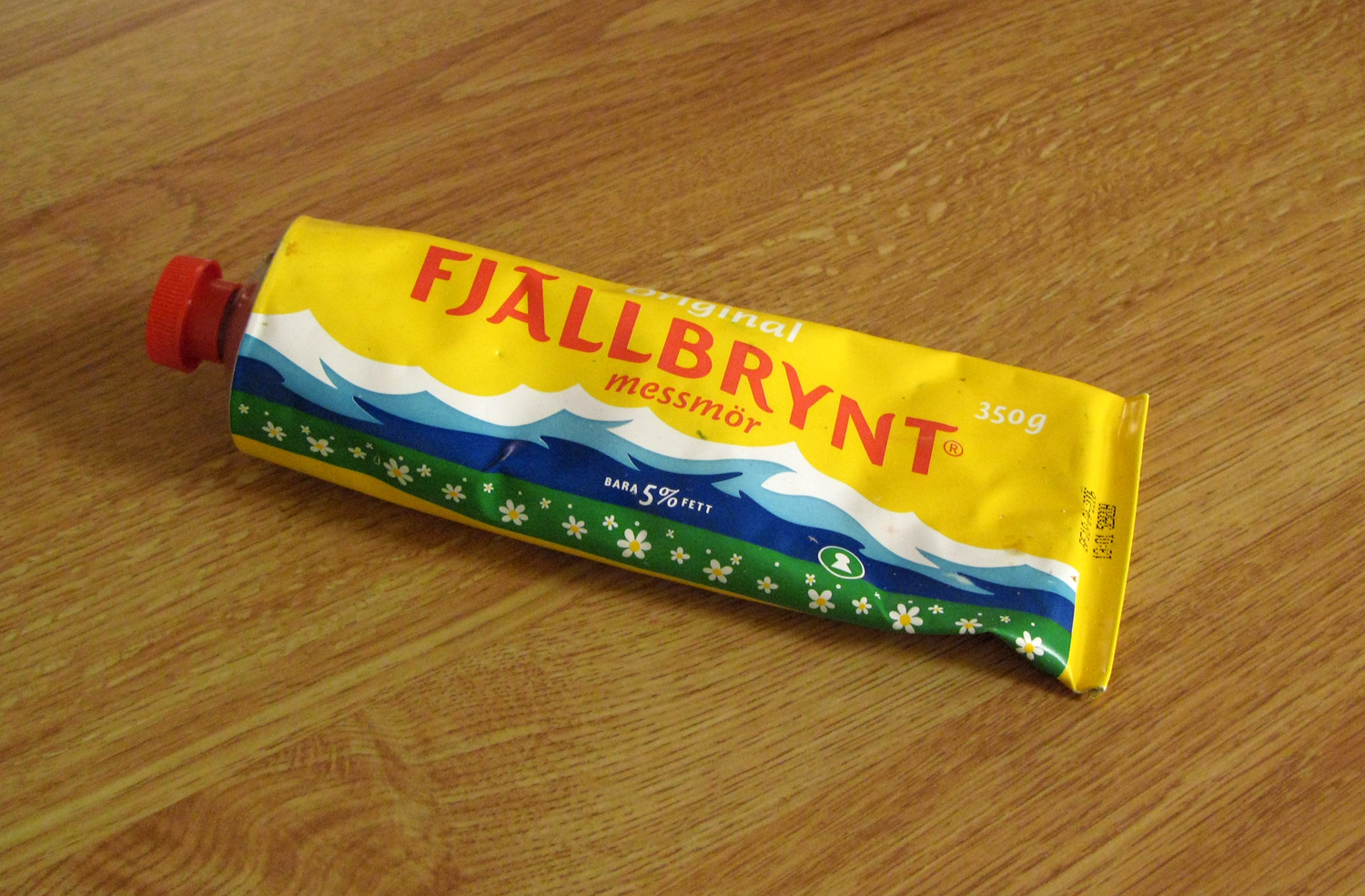 En tub messmör